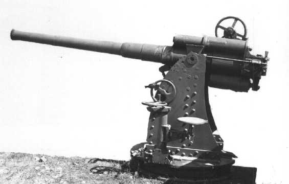 76/40 R.M. installazione costiera